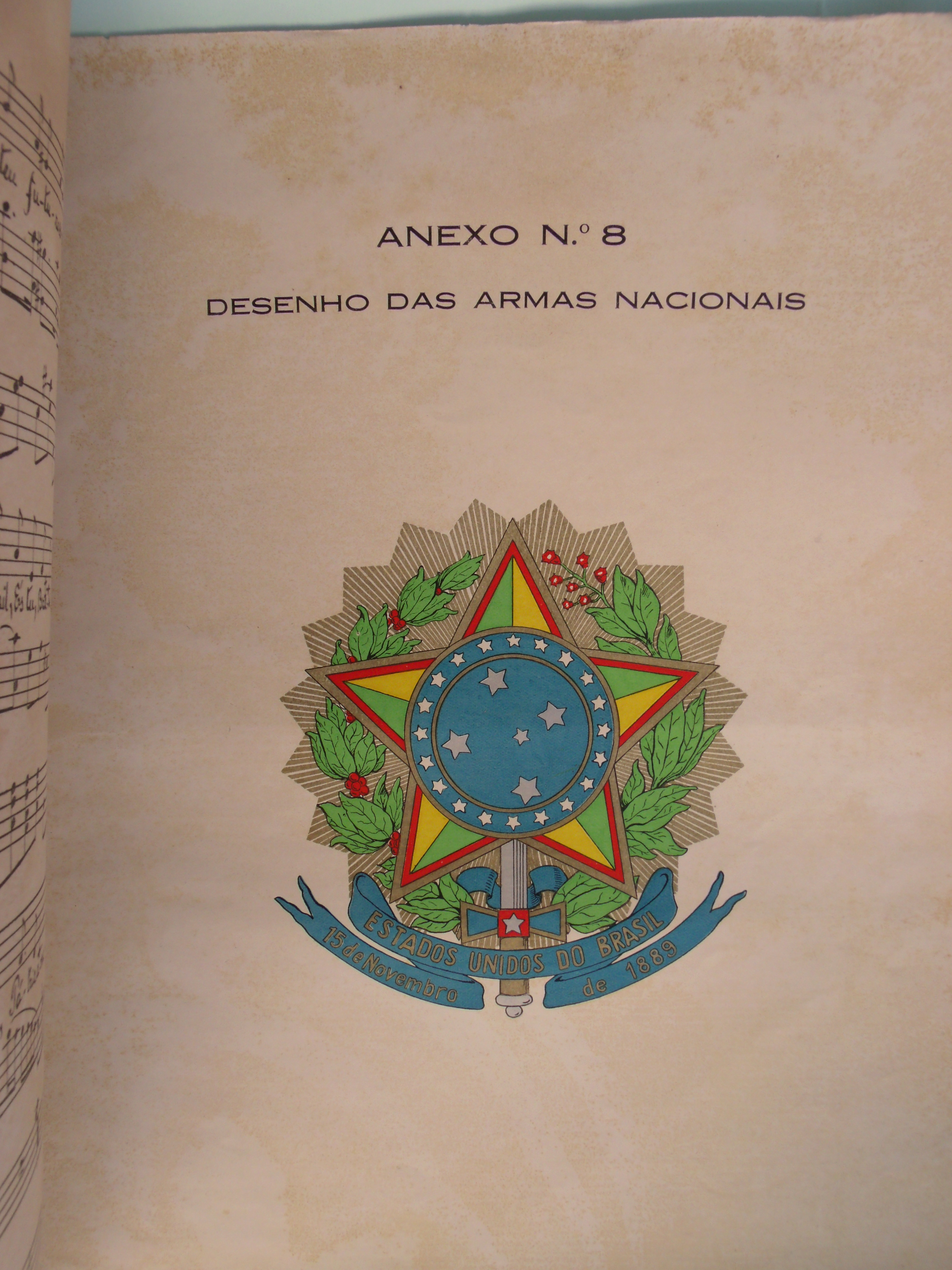 Brasão de Armas do Brasil no anexo 8 do Decreto Lei 4545 de 1942.